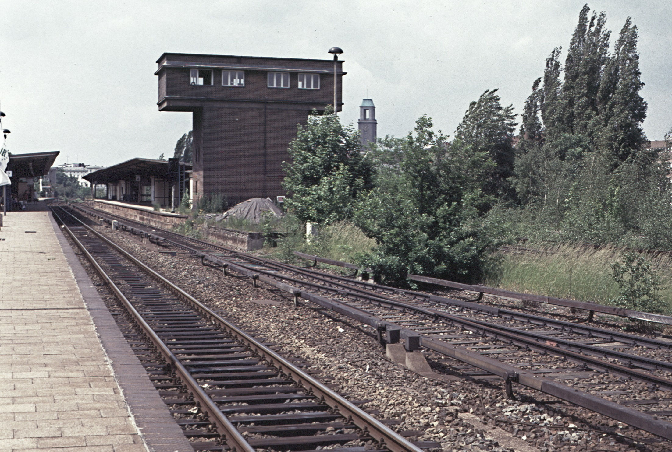 Bahnhof Berlin-Spandau, seit 1998 Berlin-Stresow